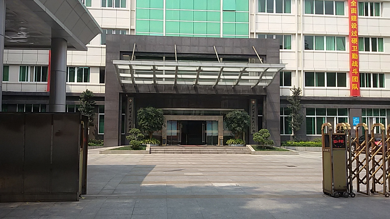 粵語: 廣州軍區機關醫院